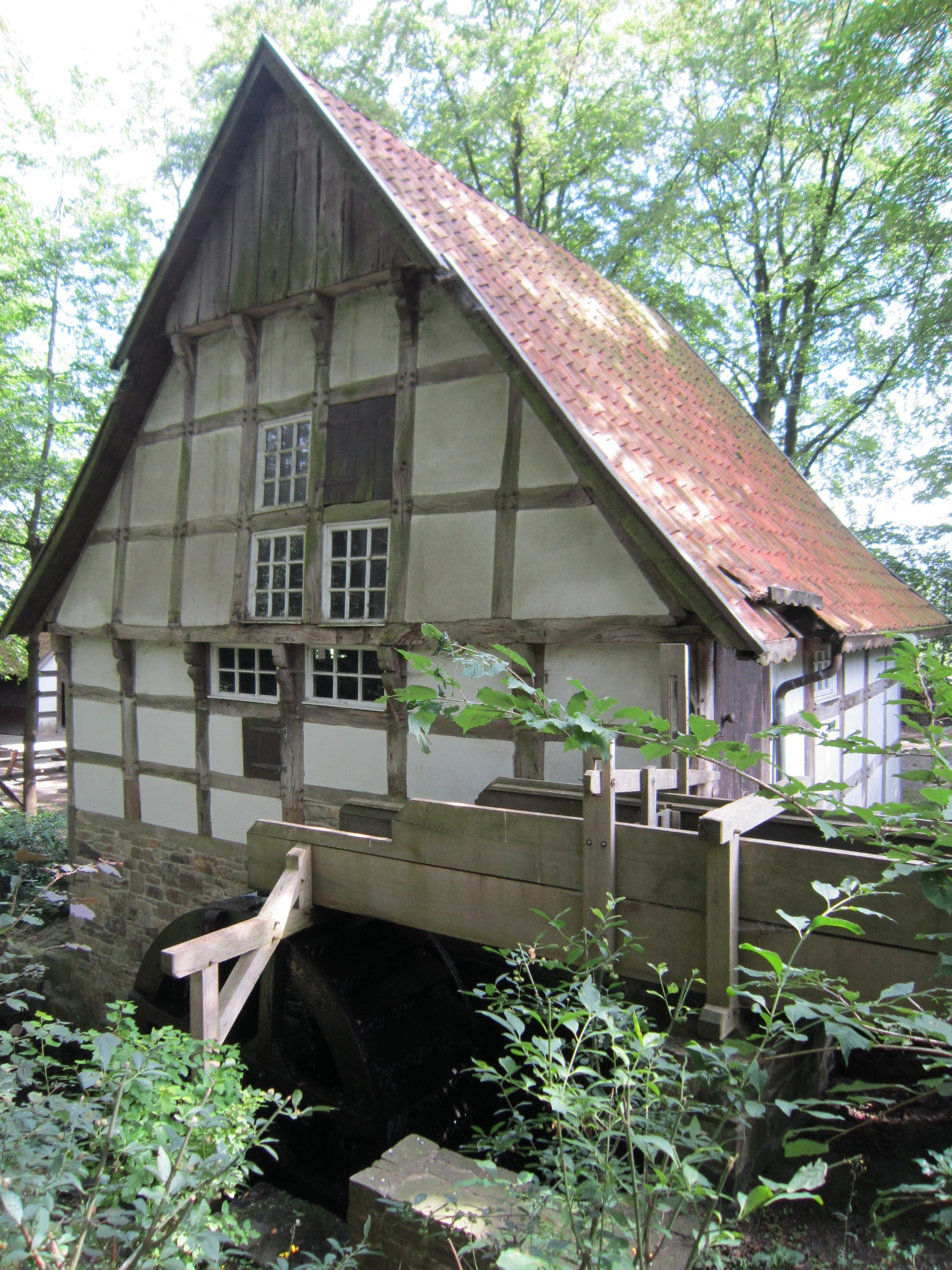 Rückseite der Wassermühle Riesau in Balkum (Stadt Bramsche, Landkreis Osnabrück, Niedersachsen)